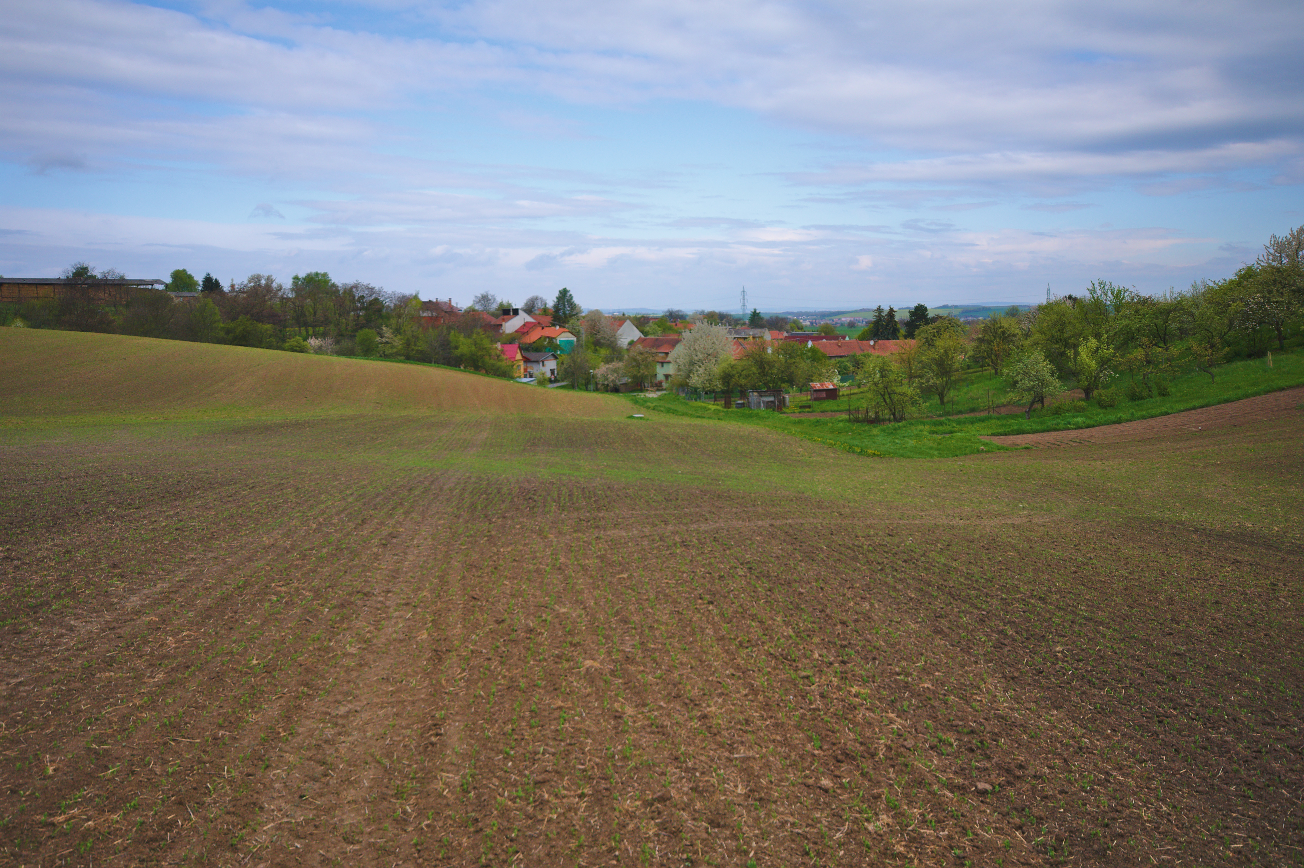 Pohled na obec od jihu, Vitčice, okres Prostějov